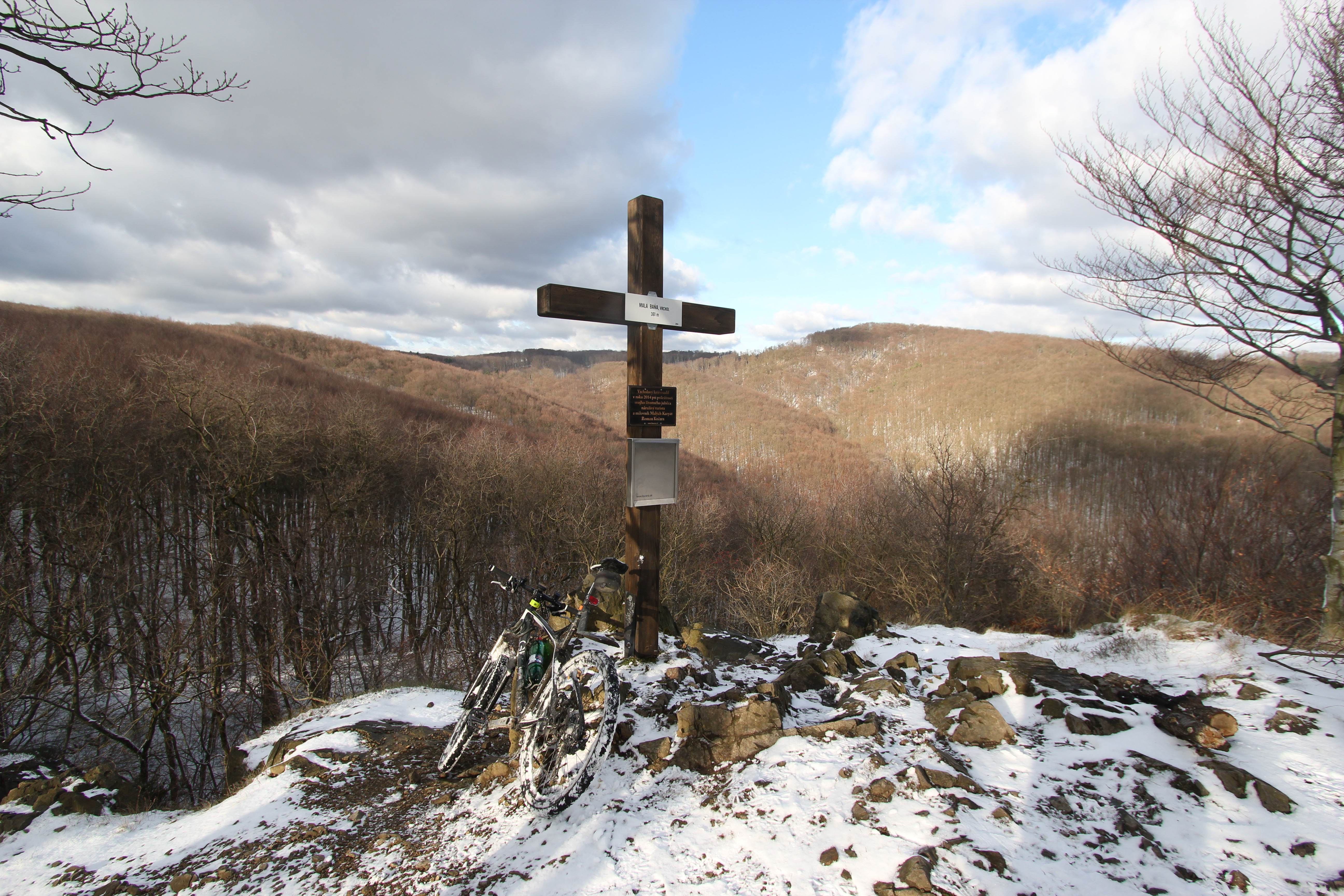 Vrcholový kríž